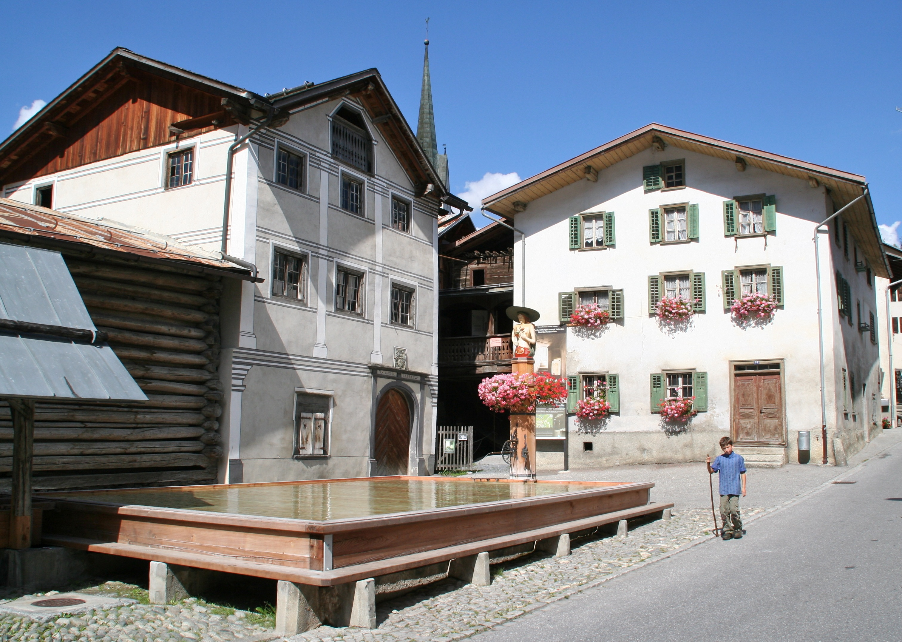 Valendas Dorfbrunnen